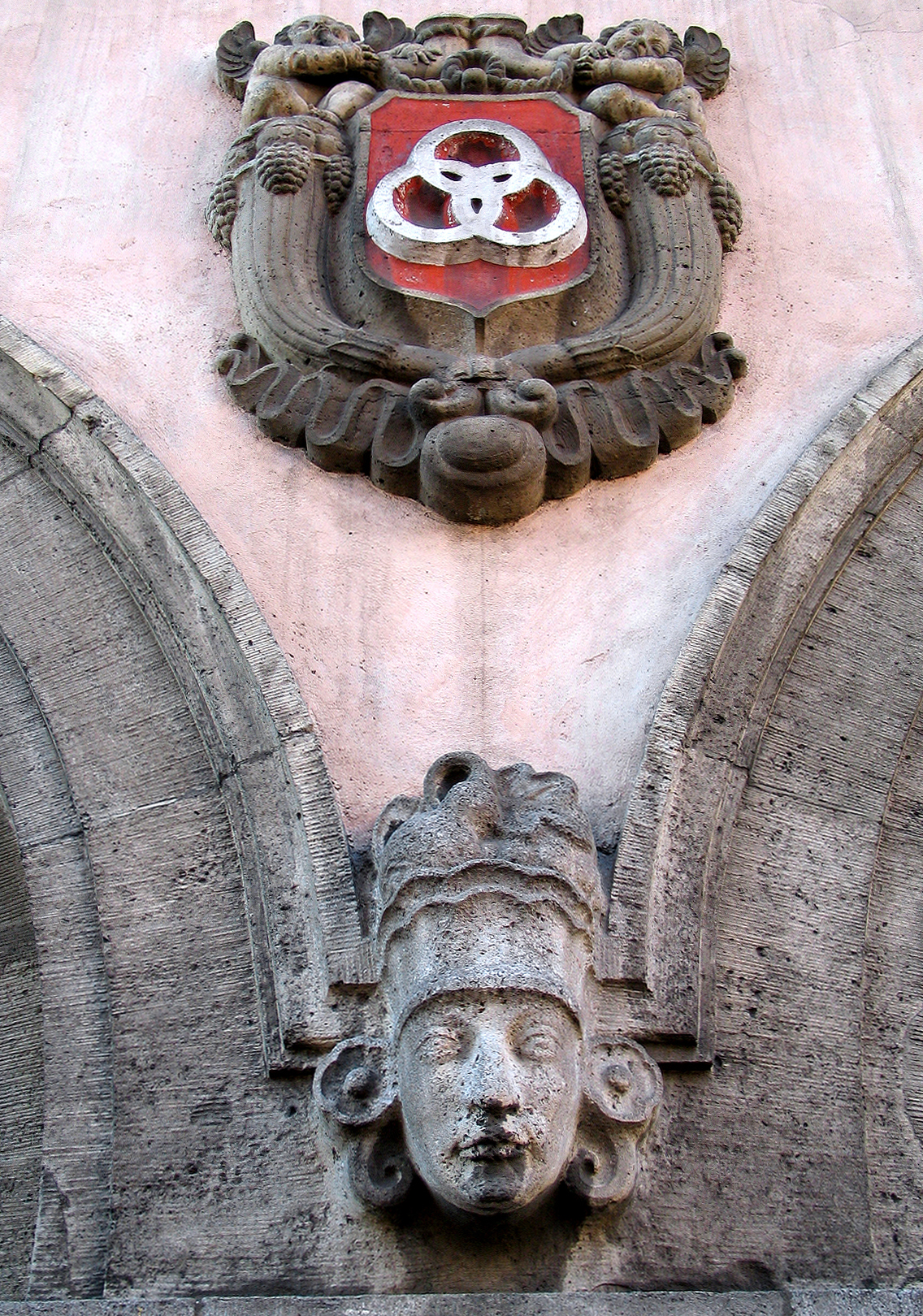 Bauschmuck des Bildhausers Ludwig Vierthaler an der Fassade des Georg von Cölln-Hauses, Am Markte 8 in Hannover gegenüber dem Eingang der Marktkirche; zwischen den Pfeilern der Arkaden ein typischerweise aus Muschelkalk gehauener Kopf, darüber in Form eines Wappens das Logo der Friedrich Krupp AG, die drei nahtlosen Eisenbahn-Radreifen von Krupp ...